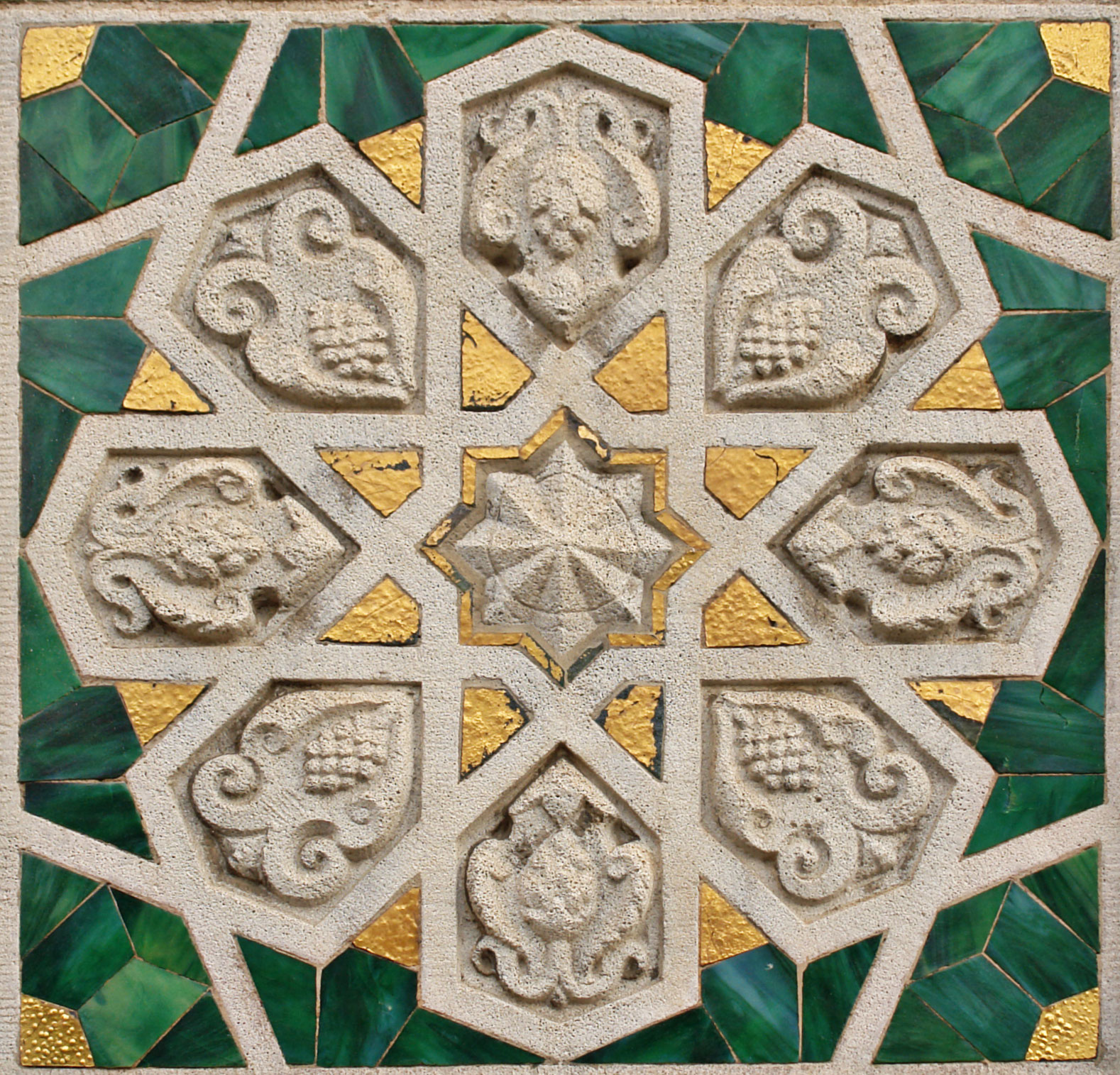 Yenidze: Detail der Ornamentik